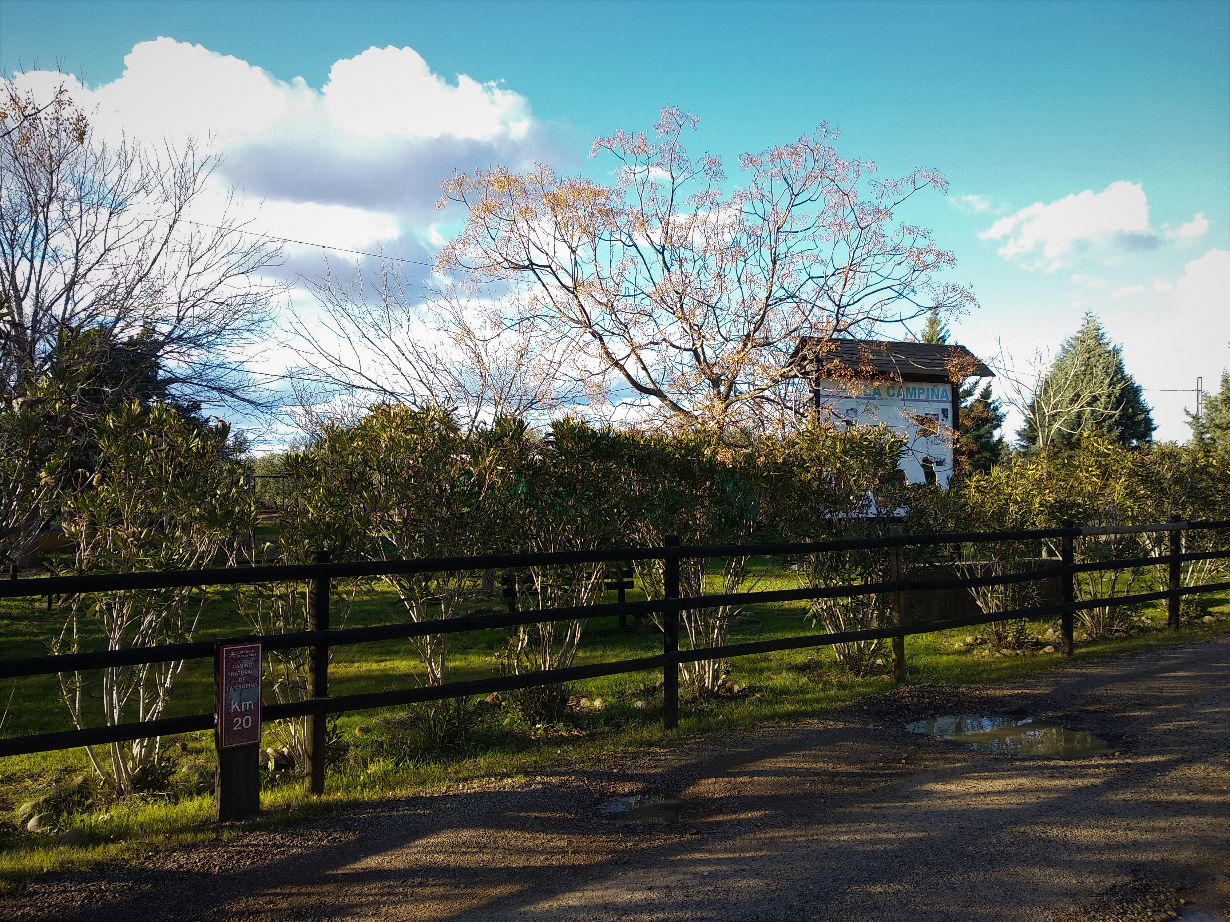 Emplazamiento del antiguo apeadero ferroviario de Las Pinedas en La Carlota (Córdoba)